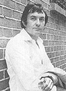 El guionista de historietas Robin Wood en 1980